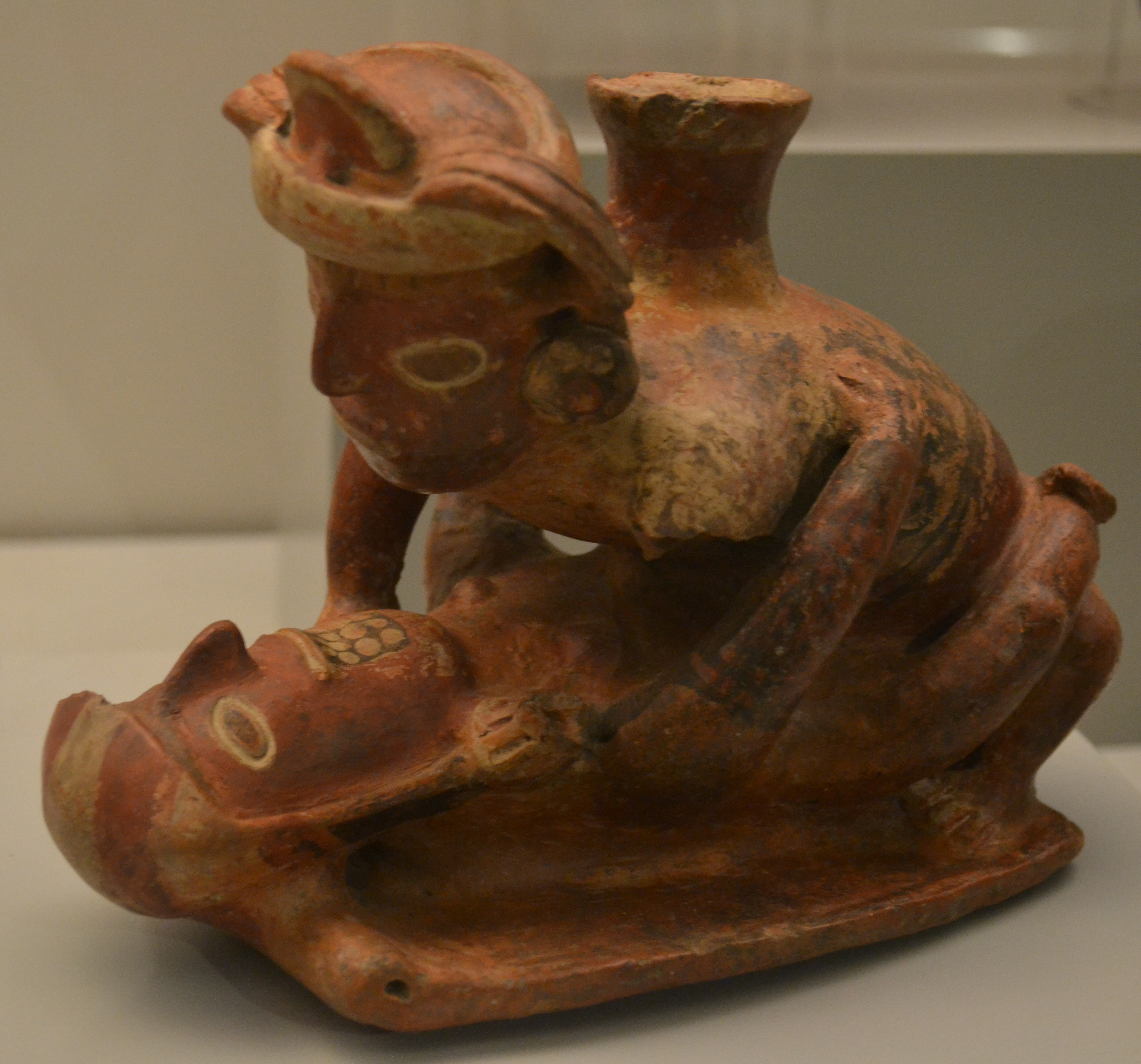 Vasija figurando una escena de coito. Cerámica pintada. Cultura Recuay. Periodo intermedio temprano (400 a. C.-300 d. C.) Perú. Museo de américa, nº inv. 11.098.